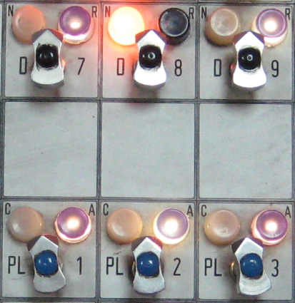 Levette da deviatoio e passaggio a livello tipo Siliani per ACEI, lampada bianca su levetta deviatoio: controllo in posizione normale, lampada bianca su levetta dal pl: controllo in posizione chiusa.